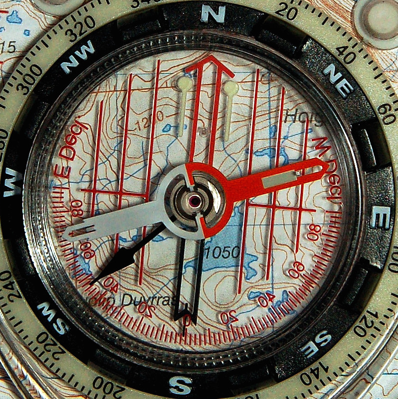 Detail kompasu buzoly. Branku (červeno-černá šipka) lze na zadní straně buzoly natočit pro korekci magnetické deklinace.